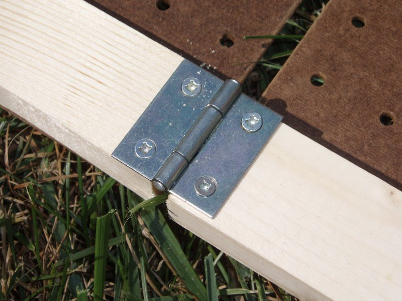 Hinge_04